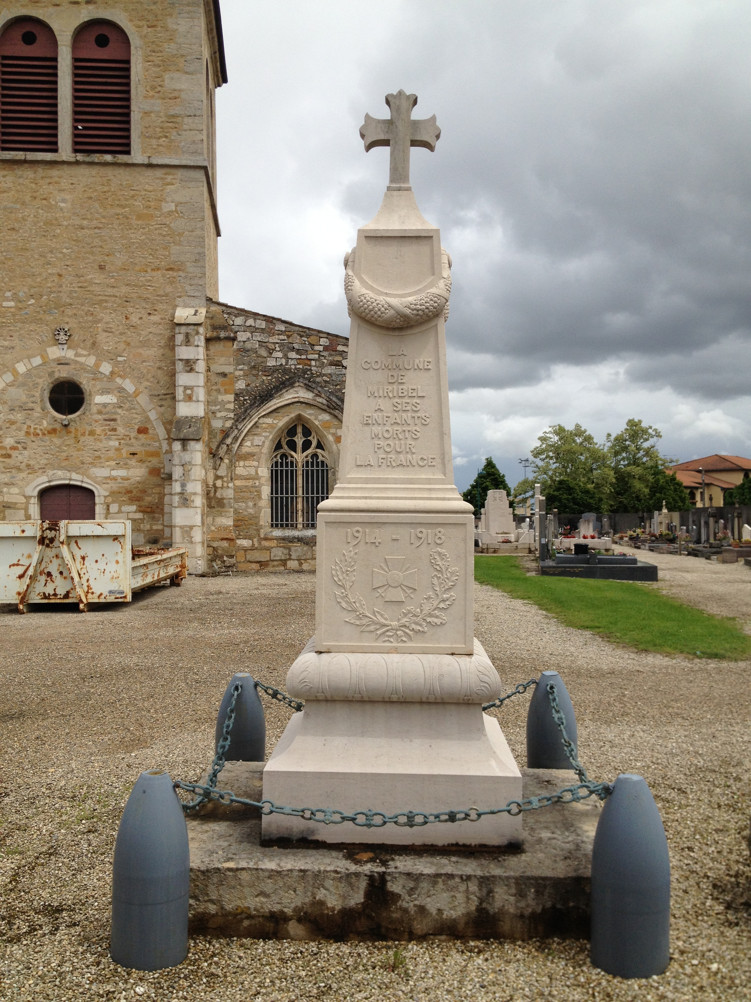 Monument aux morts 14-18 au cimetière Saint-Martin de Miribel.